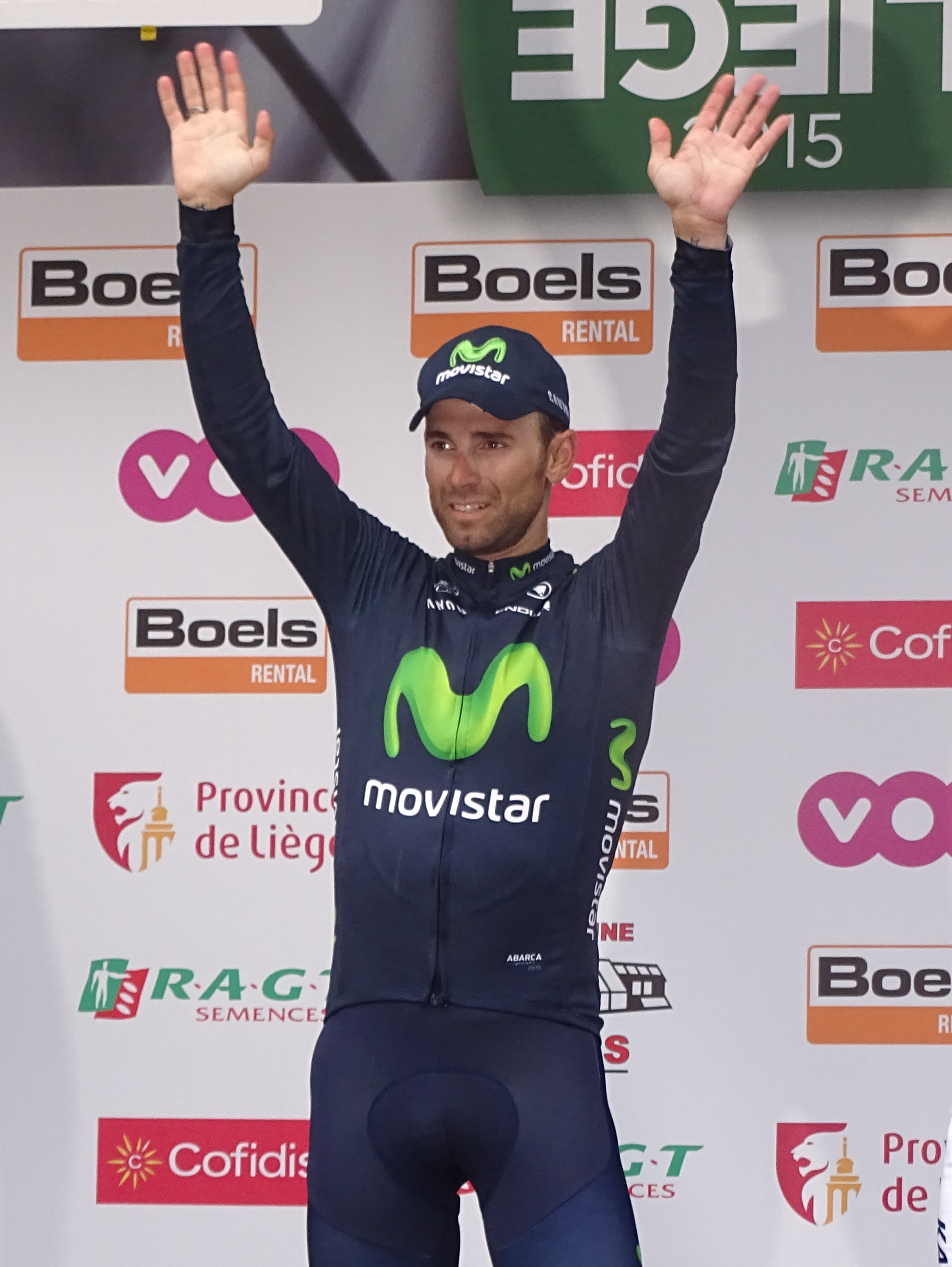 Reportage réalisé le dimanche 26 avril à l'occasion de l'arrivée de Liège-Bastogne-Liège 2015 à Ans, Belgique.